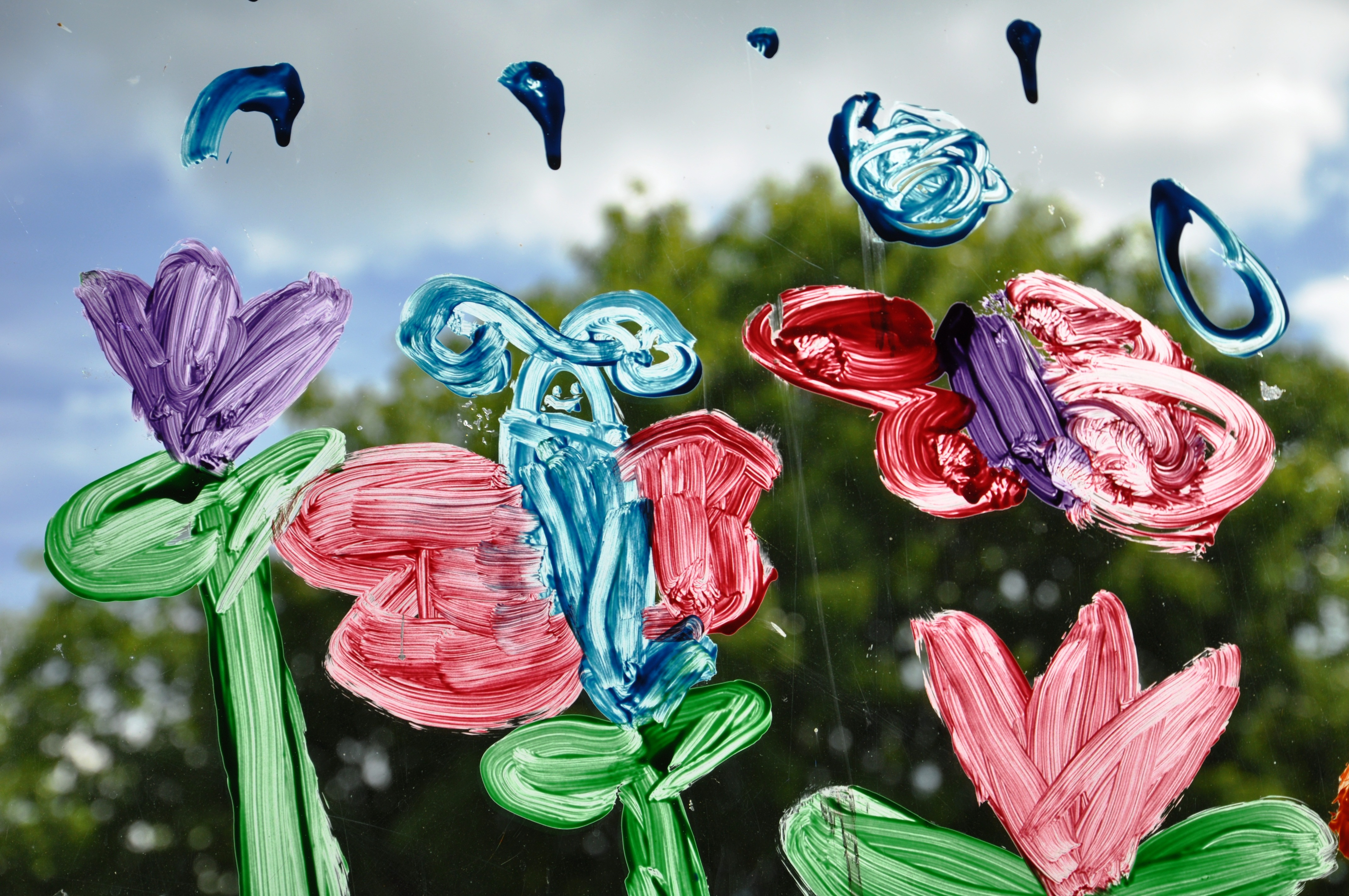 Raamschildering op de Werkplaats Kindergemeenschap in Bilthoven.